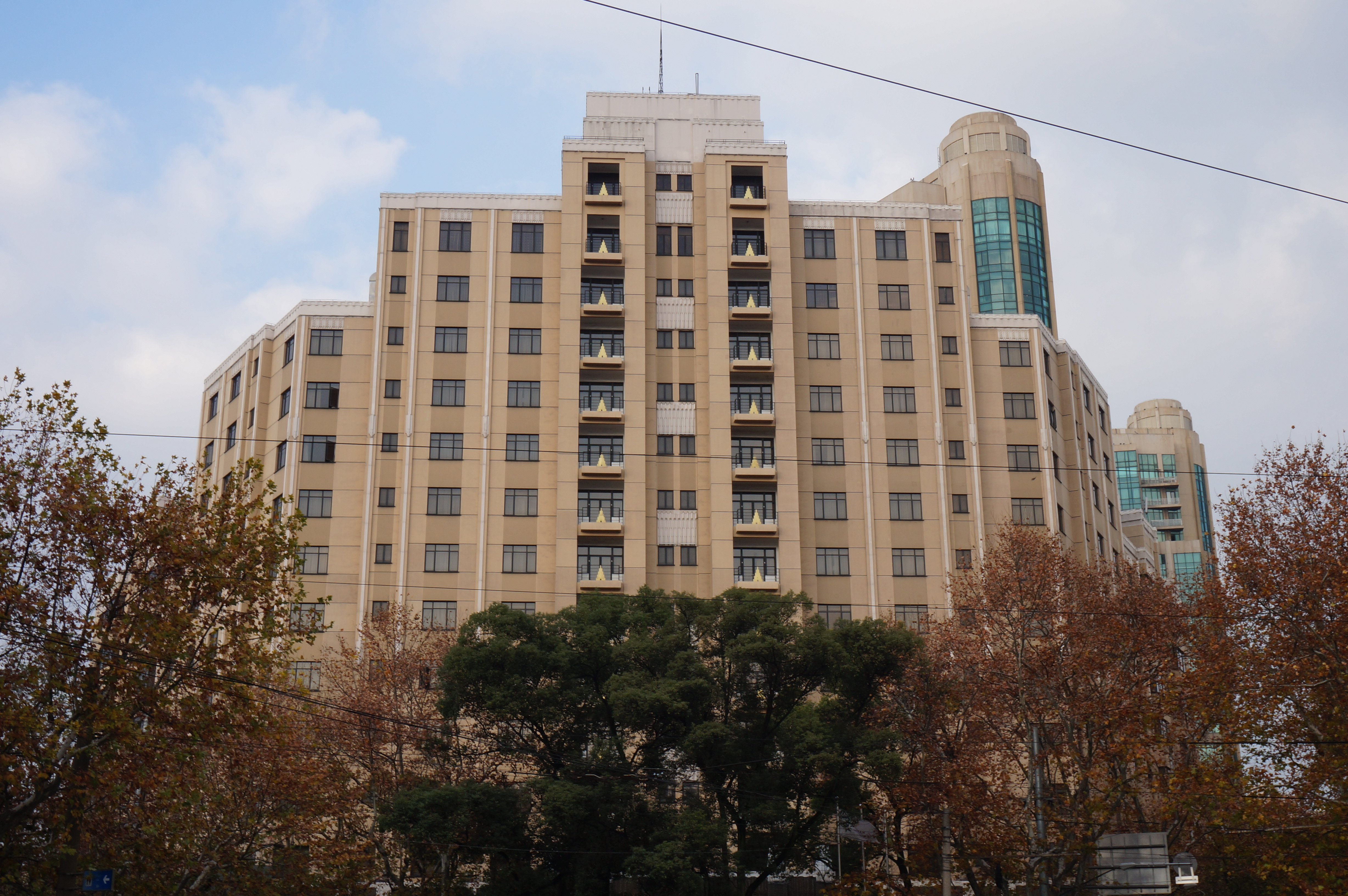 衡山宾馆（毕卡第公寓）